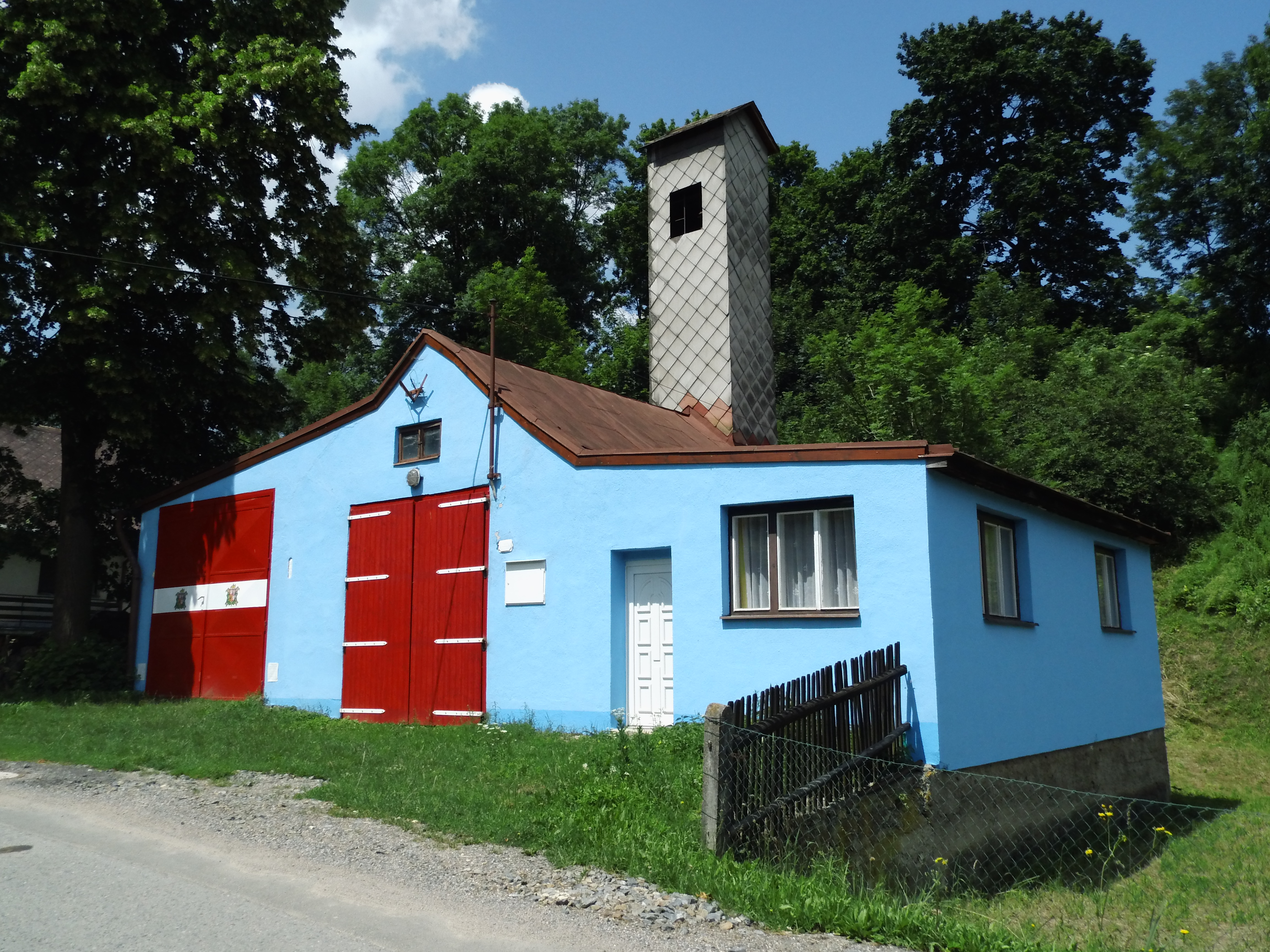 požární zbrojnice v horní části obce